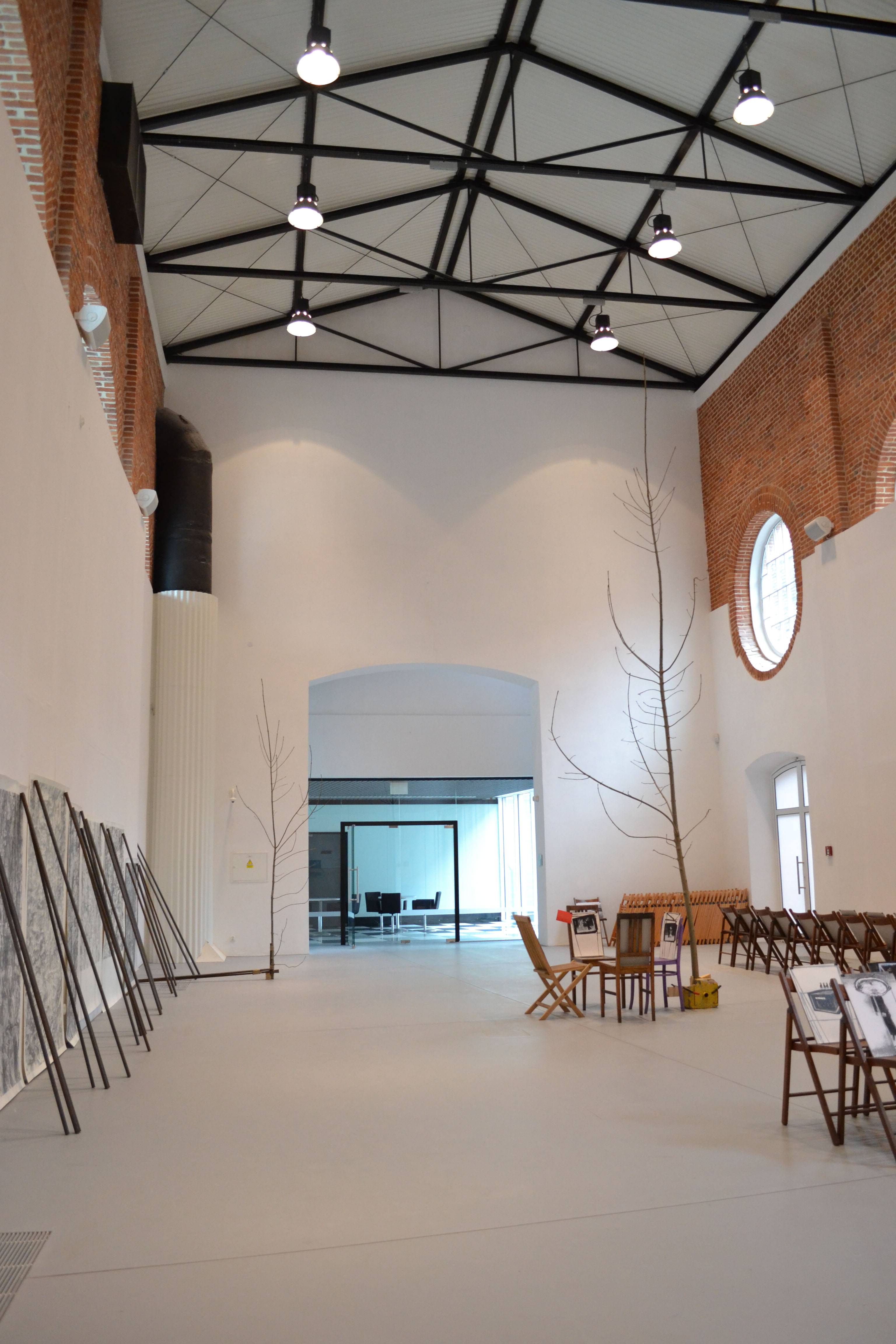 MCSW Elektrownia Radom - sala ekspozycyjna